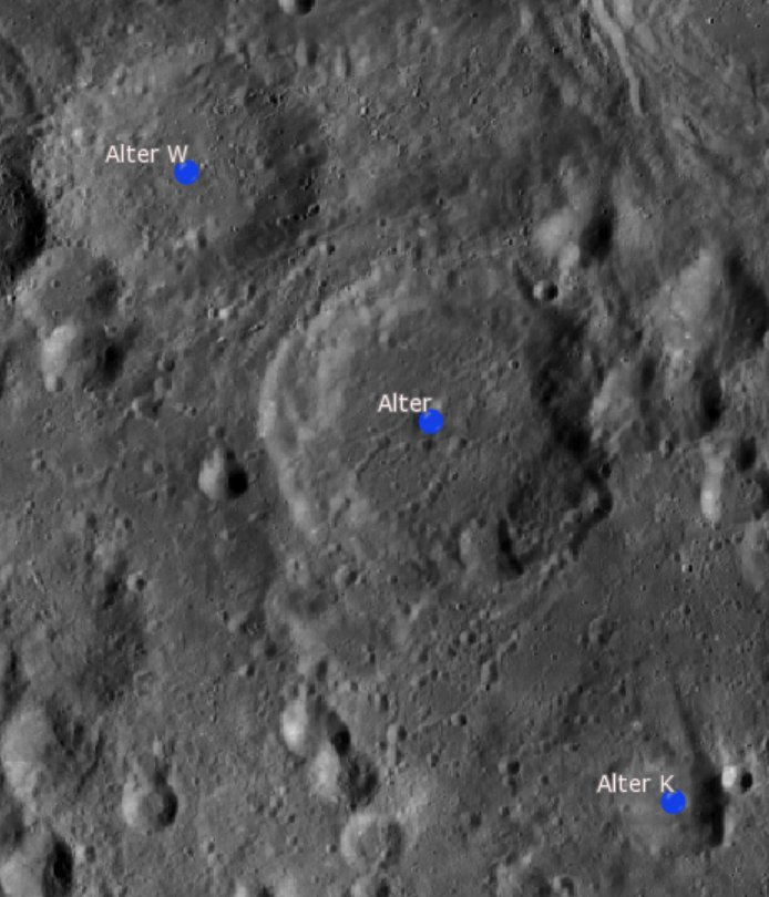 Cráter lunar Alter. Cráteres satélite. (Imagen LRO)